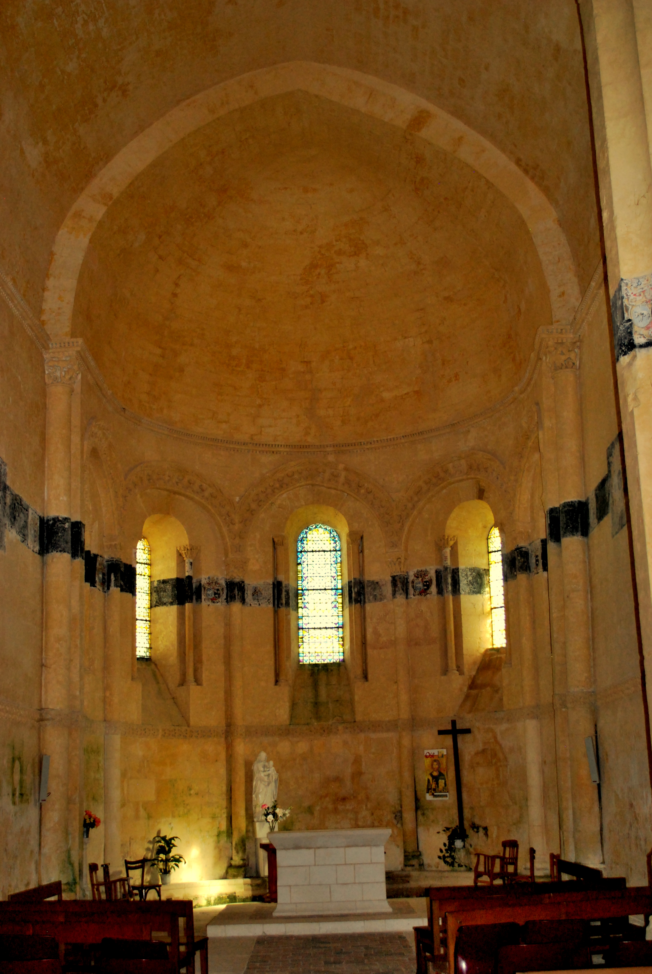 Église Saint-Trojan de Rétaud